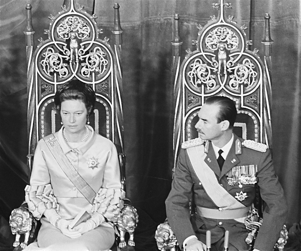 De troonwisseling in Luxemburg, de [Groot-]Hertogelijke familie